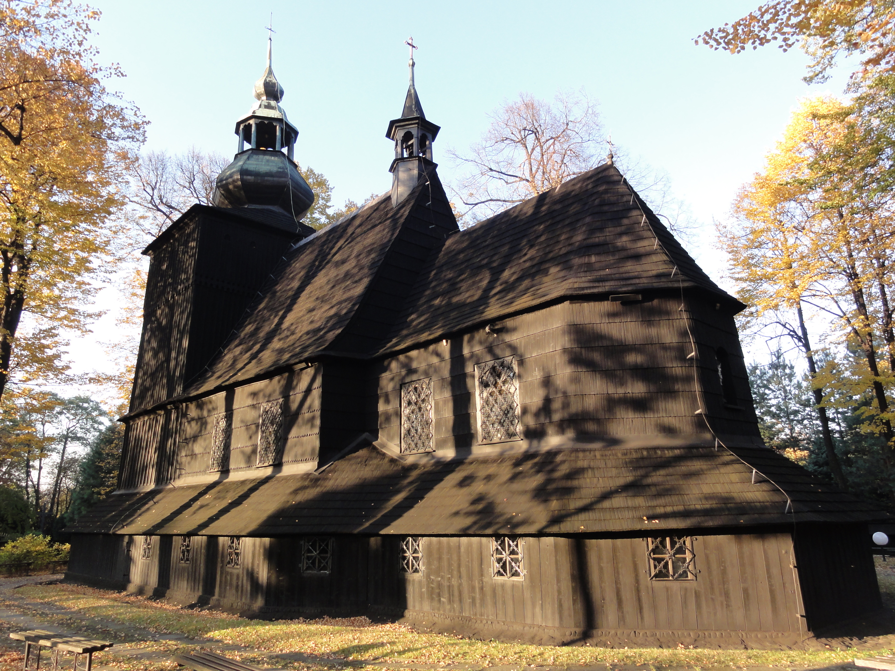 Bielsko-Biała Mikuszowice (Krakowskie) - kościół św. Barbary